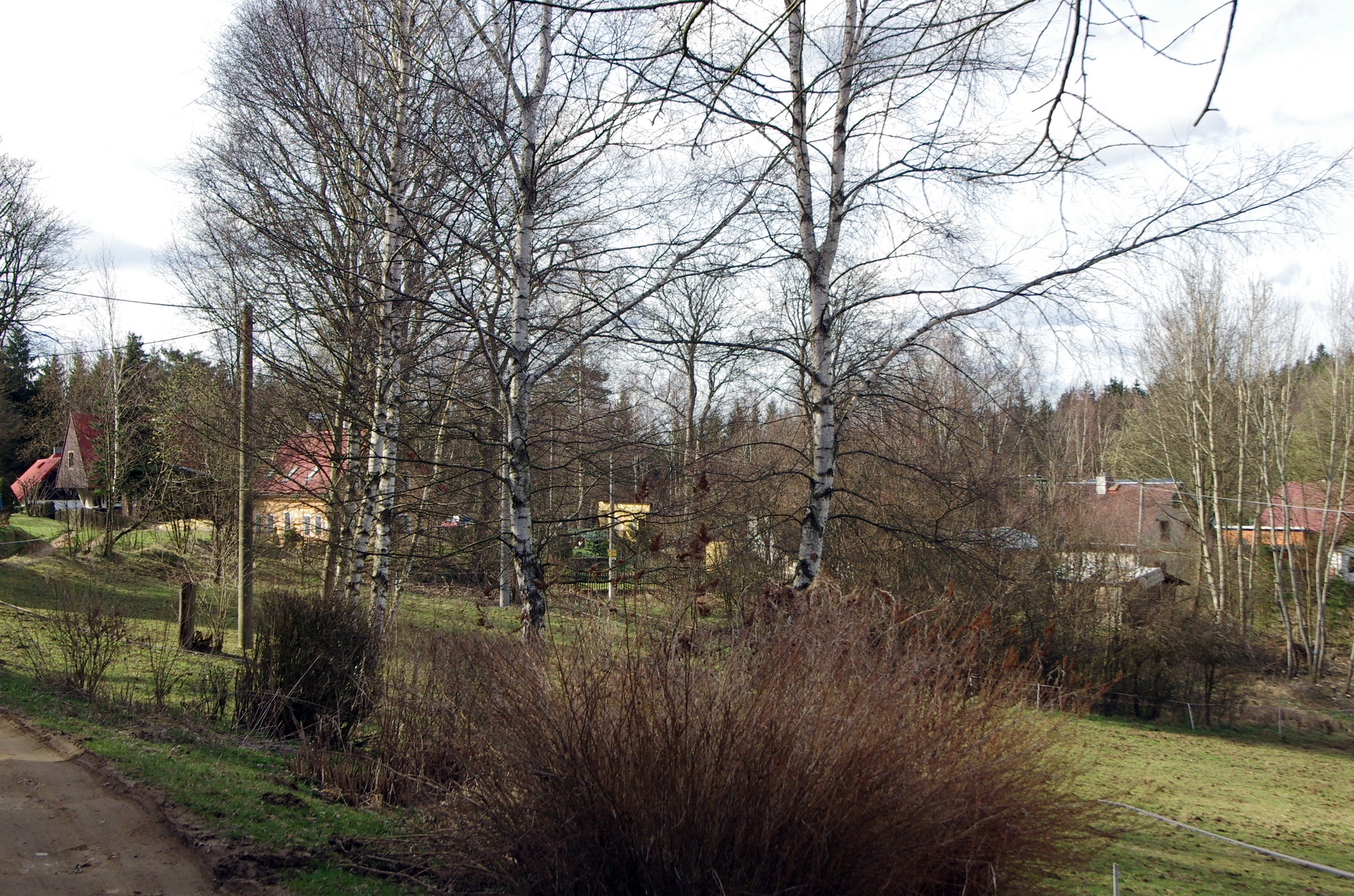 Nové Domy, místní část Oloví, okres Sokolov